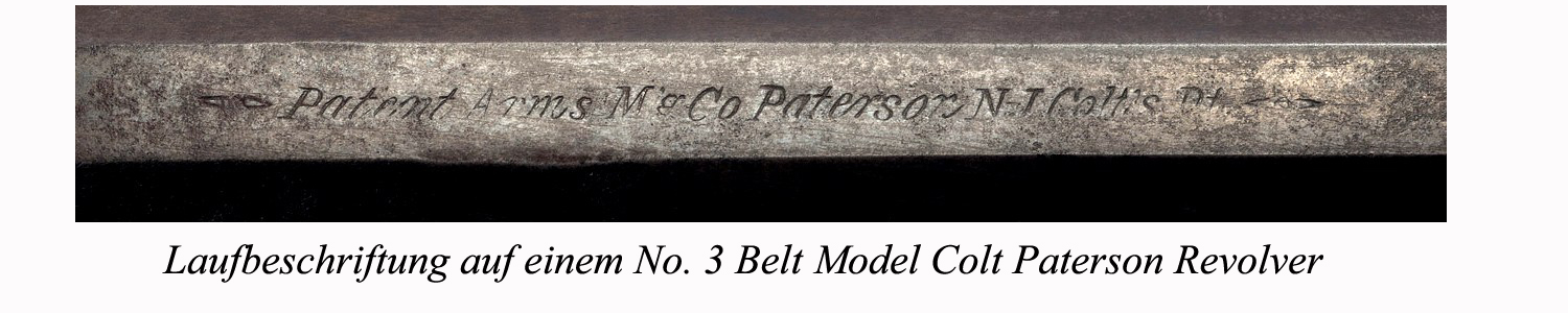 Belt Model Lauf